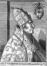 Pope Sixtus IV